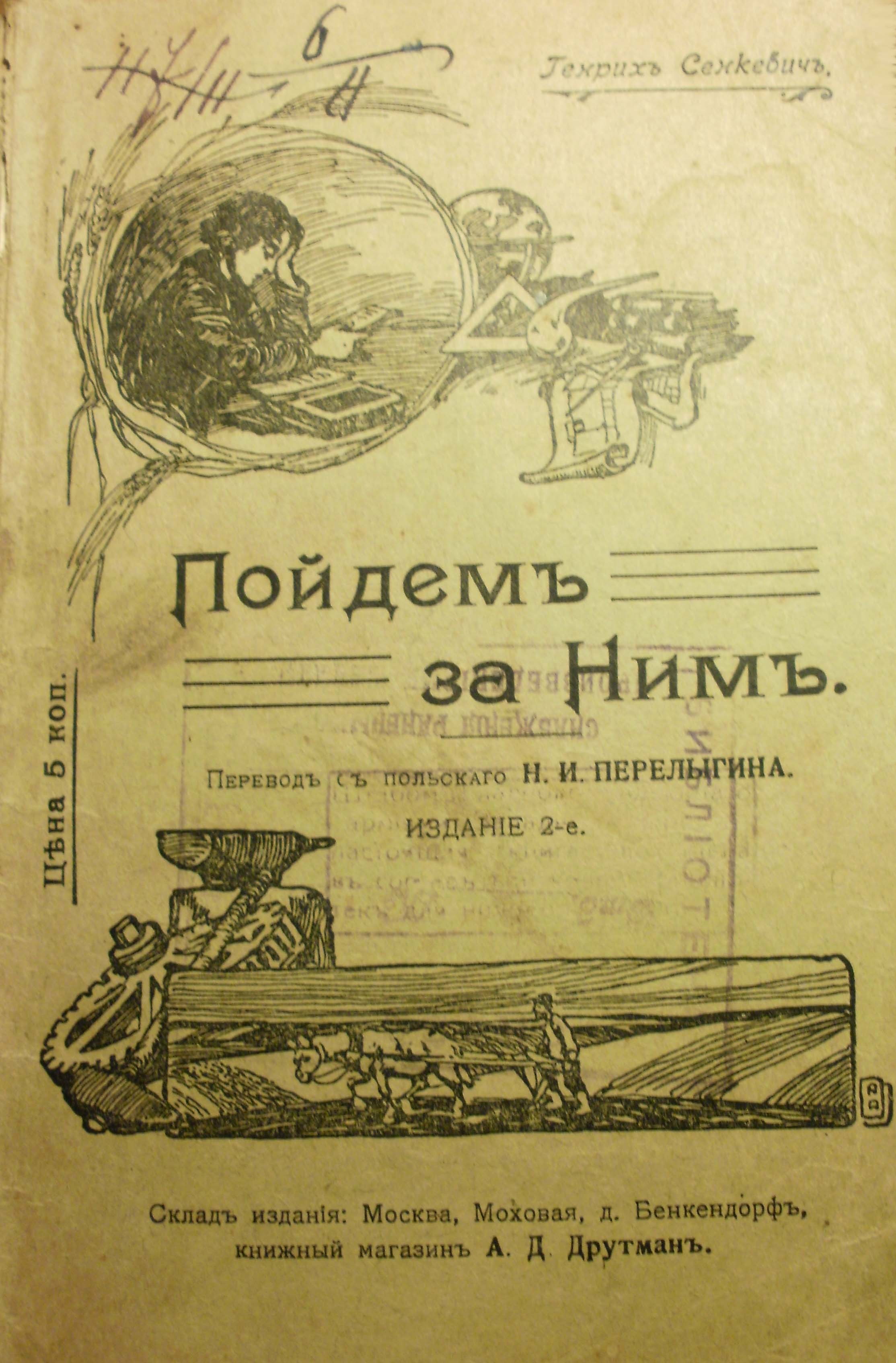 Второе издание рассказа Сенкевича "Пойдем за ним", 1911